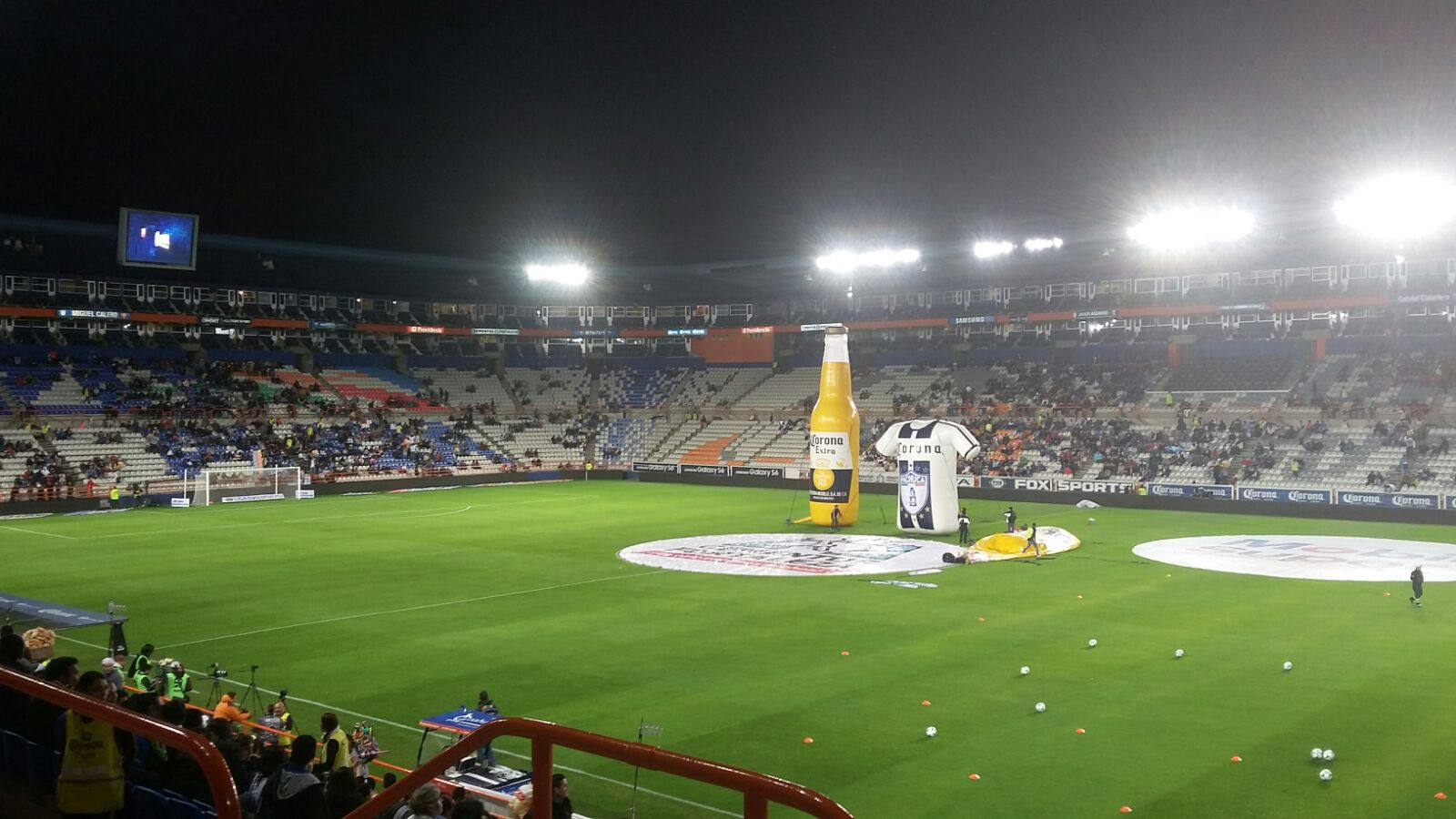 Mediotiempo del partido Cruz Azul vs Pachuca en estadio Hidalgo